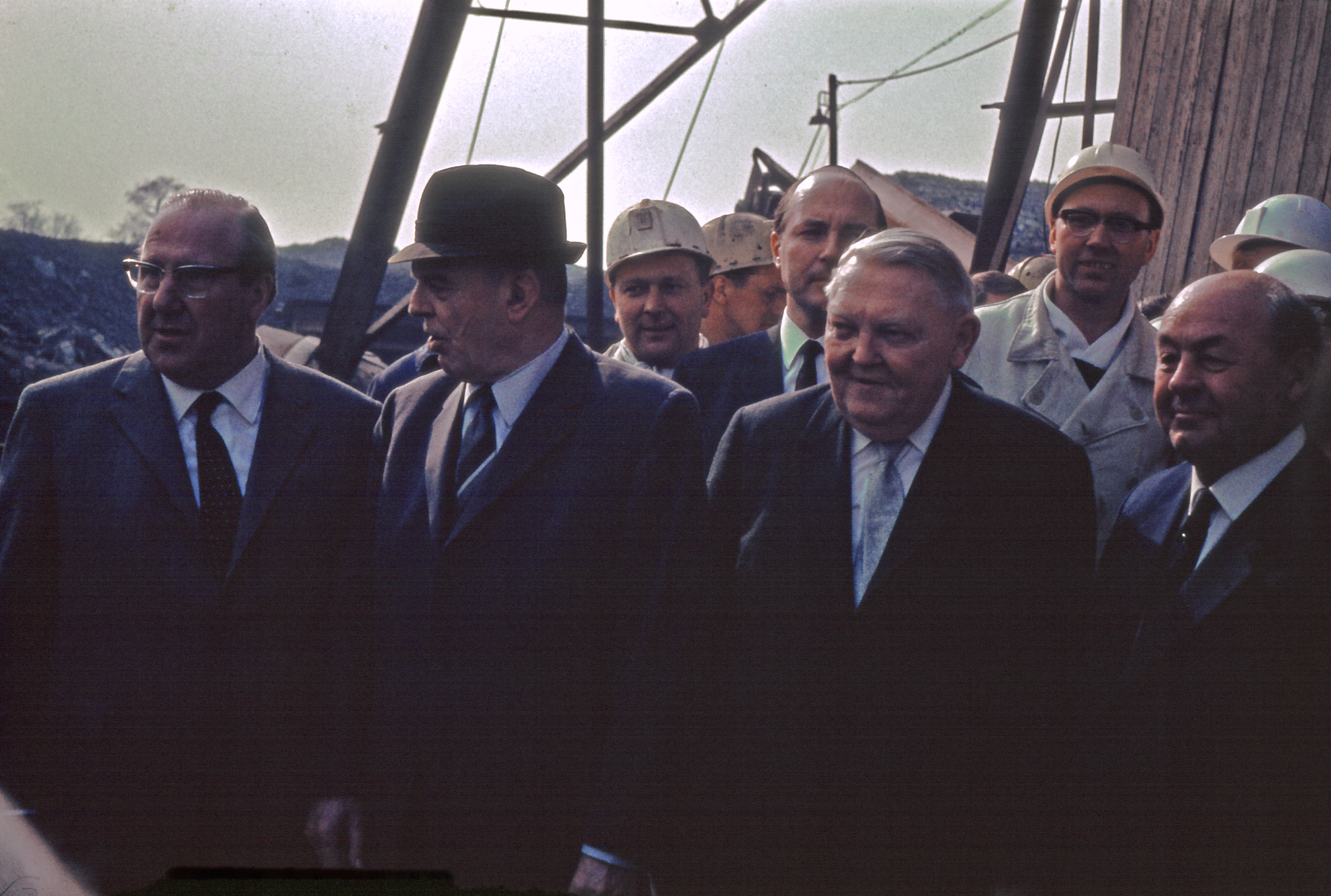 Vordere Reihe von links: Ministerpräsident (NRW) Franz Meyers, Assessor Bähr, Bundeskanzler Ludwig Erhard, Bergwerksdirektor Helmuth Heintzmann am 2. April 1965 beim Besuch der Zeche Friedrich der Große, Schacht 6, in Herne